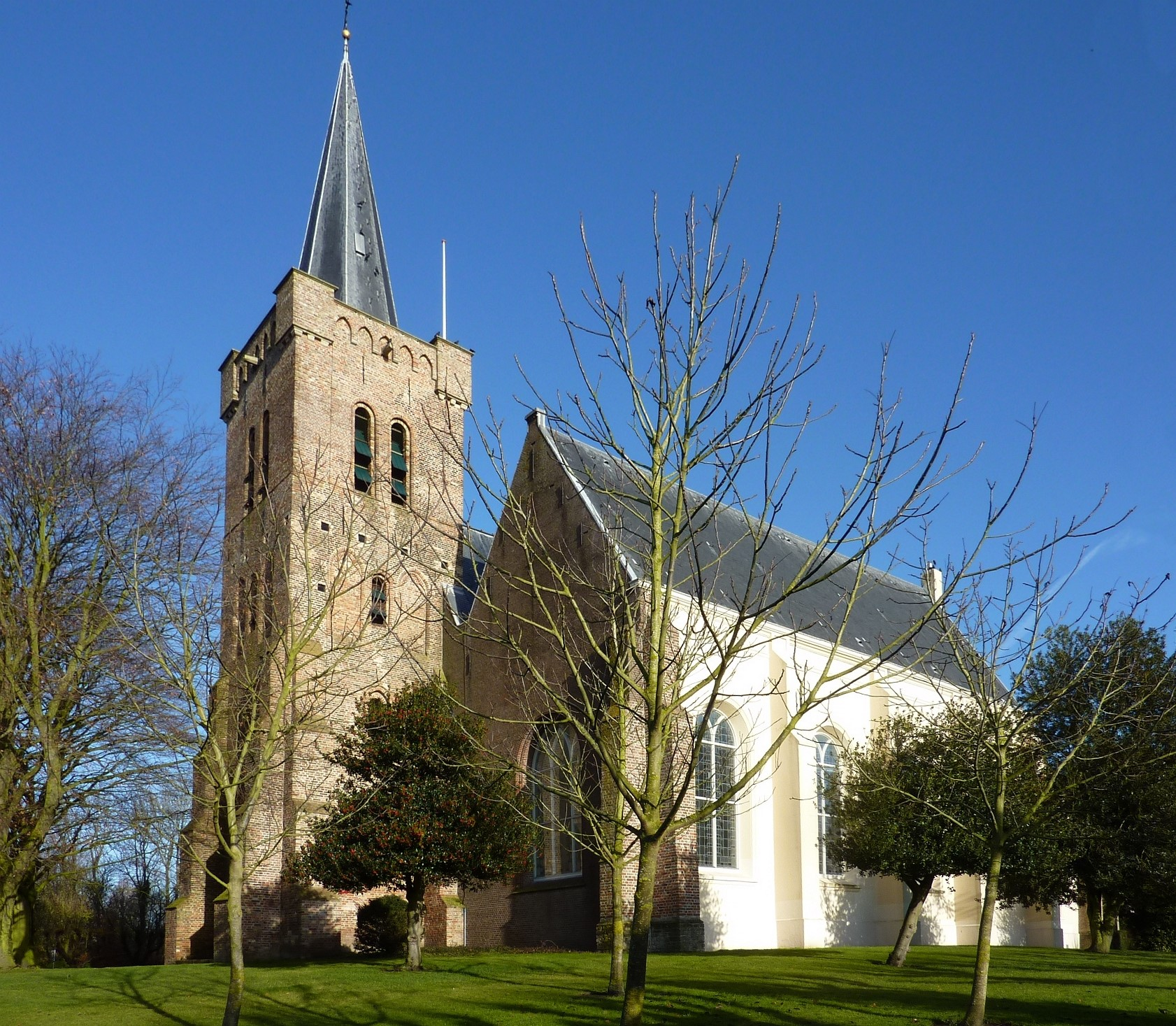 Sint Maartenskerk (Wemeldinge)